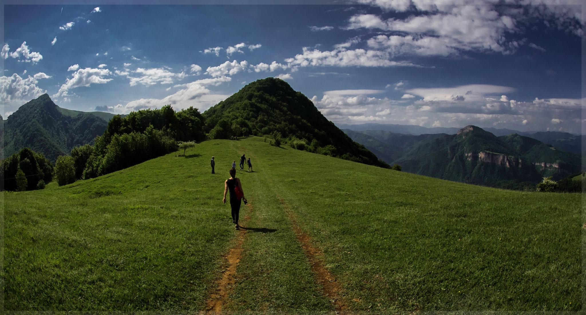 Тетевенски Балкан